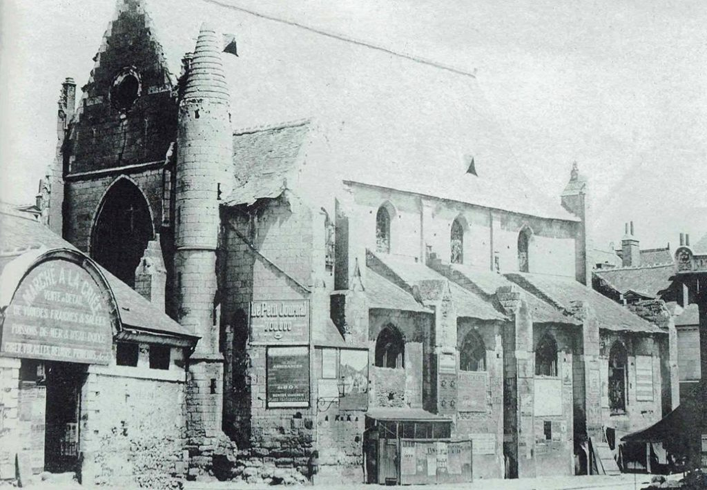 Vieux tours, place du grand marché, église Saint-Clément, photographie réalisé en 1883, avant la destruction de l'église